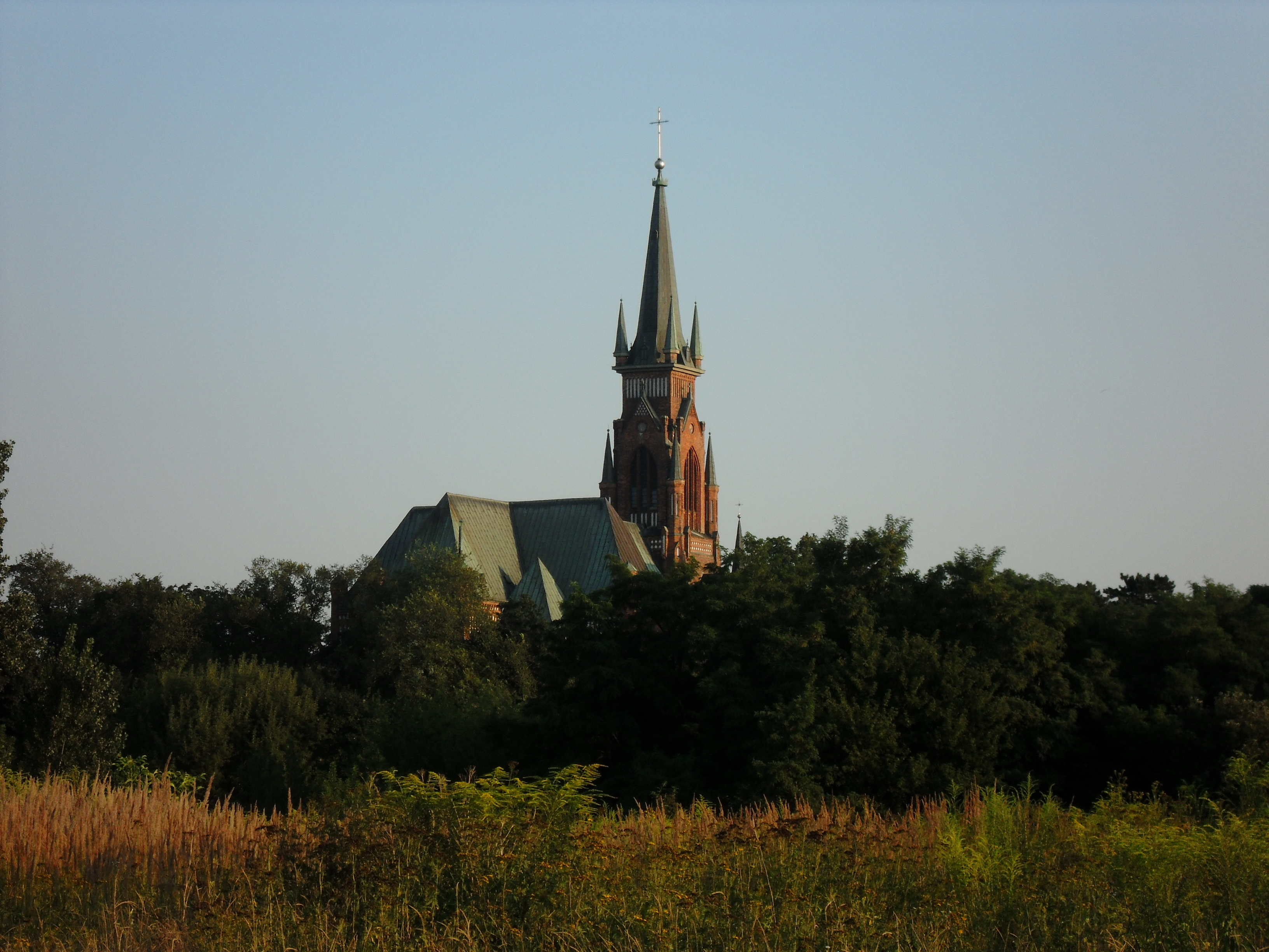 Kościół Niepokalanego Poczęcia NMP w Pruszkowie (Żbików), widok z ul. Żbikowskiej